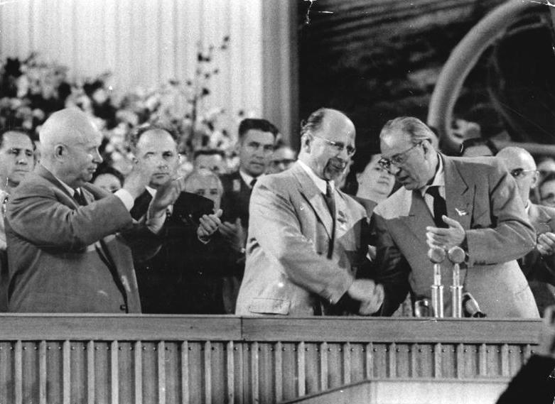 Zentralbild Junge 10.7.1958 V. Parteitag der SED vom 10. bis 16.7.1958 in der Werner-Seelenbinder-Halle, Berlin, 1. Tag: UBz: Ministerpräsident Otto Grotewohl, Mitglied des Politbüros des Zk der SED (rechts) dankt dem Ersten Sekretär des ZK der SED, Walter Ulbricht, für seine Ausführungen. (links) N. S. Chruschtschow, 1. Sekretär des Zk der KPdSU.